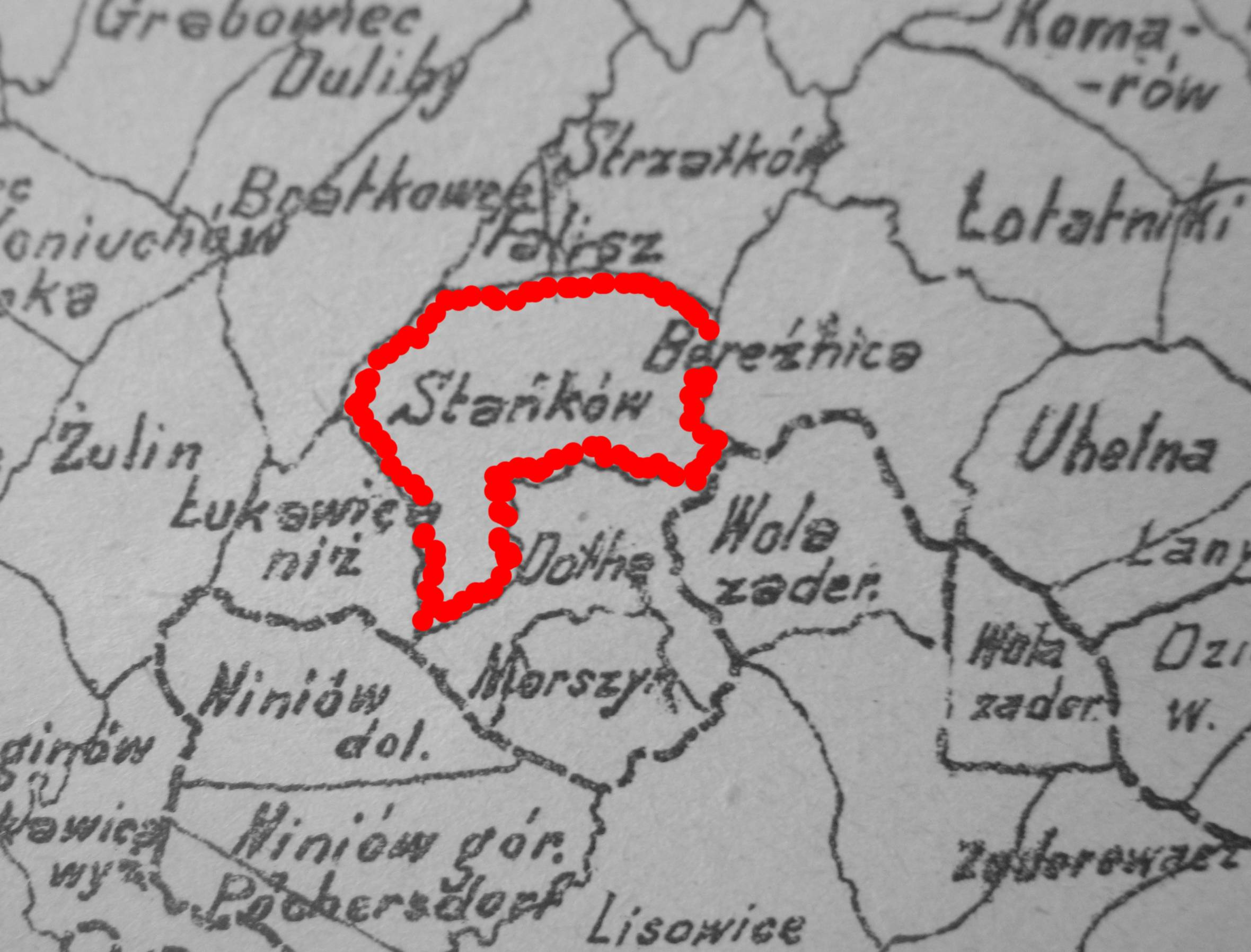 Stankiv-mezhi.jpg: Межі с. Станків